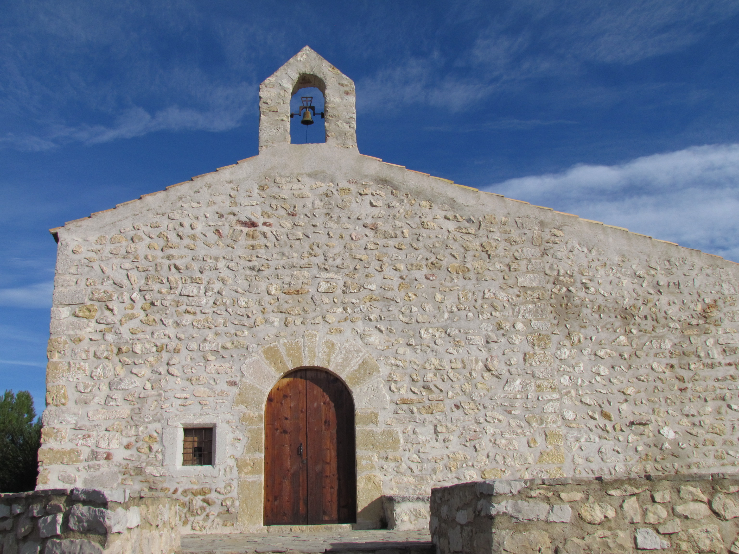 Façana de l'ermita de Sant Cristòfol de Sant Mateu (Baix Maestrat)